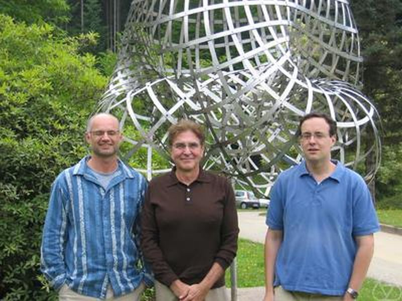 From left: Peter Teichner, Ronald J. Stern, Denis Auroux, Oberwolfach 2006